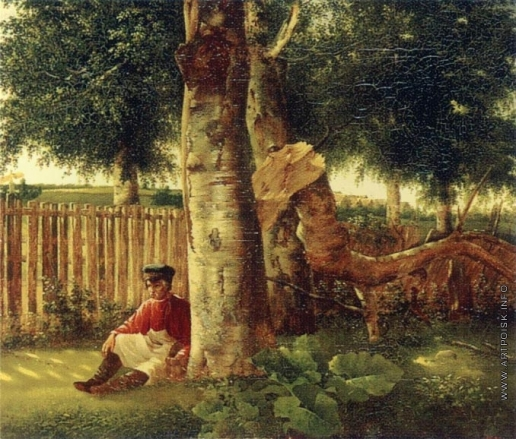 Иванов И.А. Пейзаж в Успенском, имении А.Р. Томилова. 1846 год, 54 х 76 см. Хранится в Государственной Третьяковской галереи